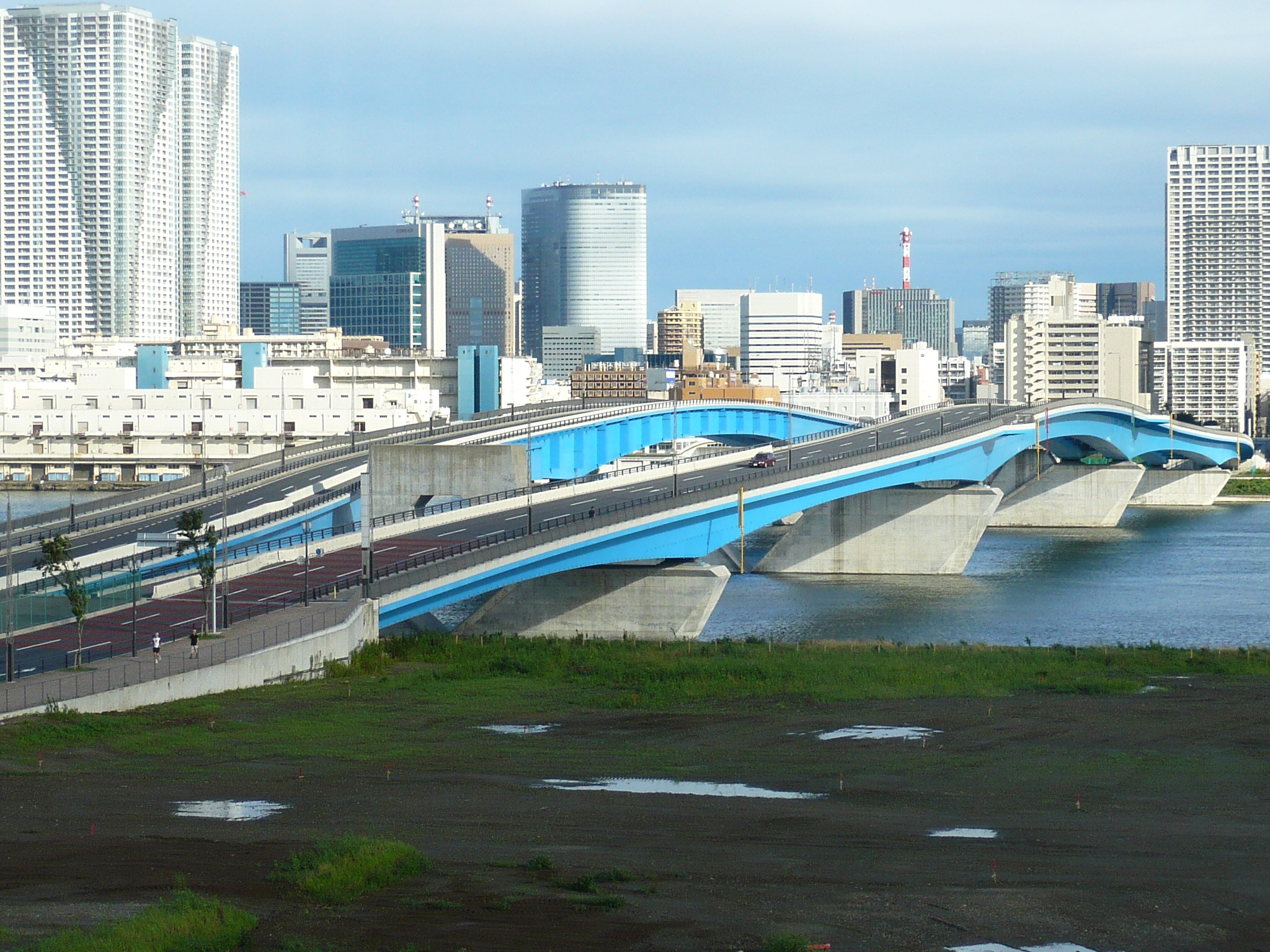 東京都江東区と中央区の間に架かる晴海大橋 Harumi-Oohashi(Great Harumi Bridge、晴海大橋) in Koto-ku and Chuo-ku,Tokyo,Japan.